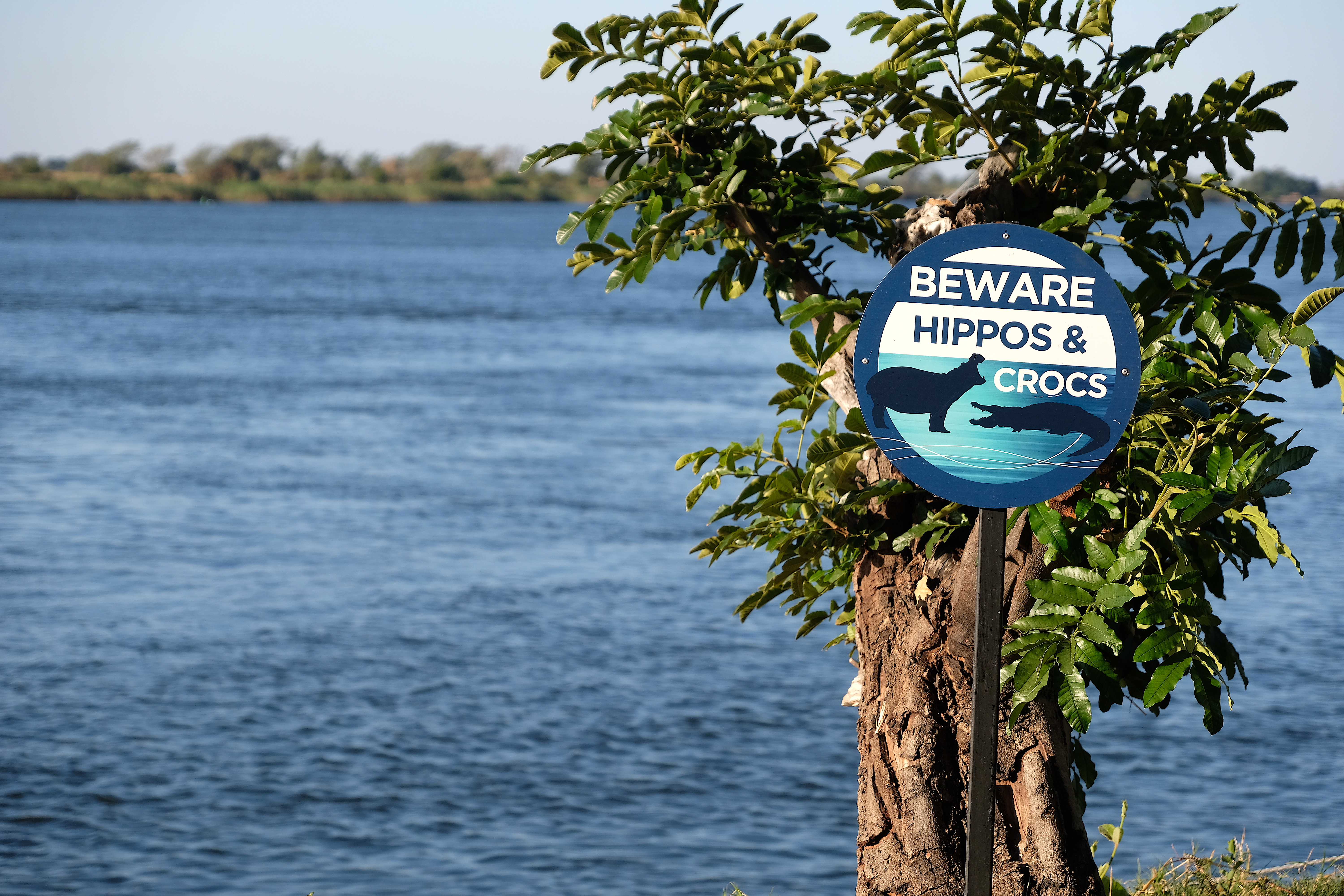 Hippos am Sambesi